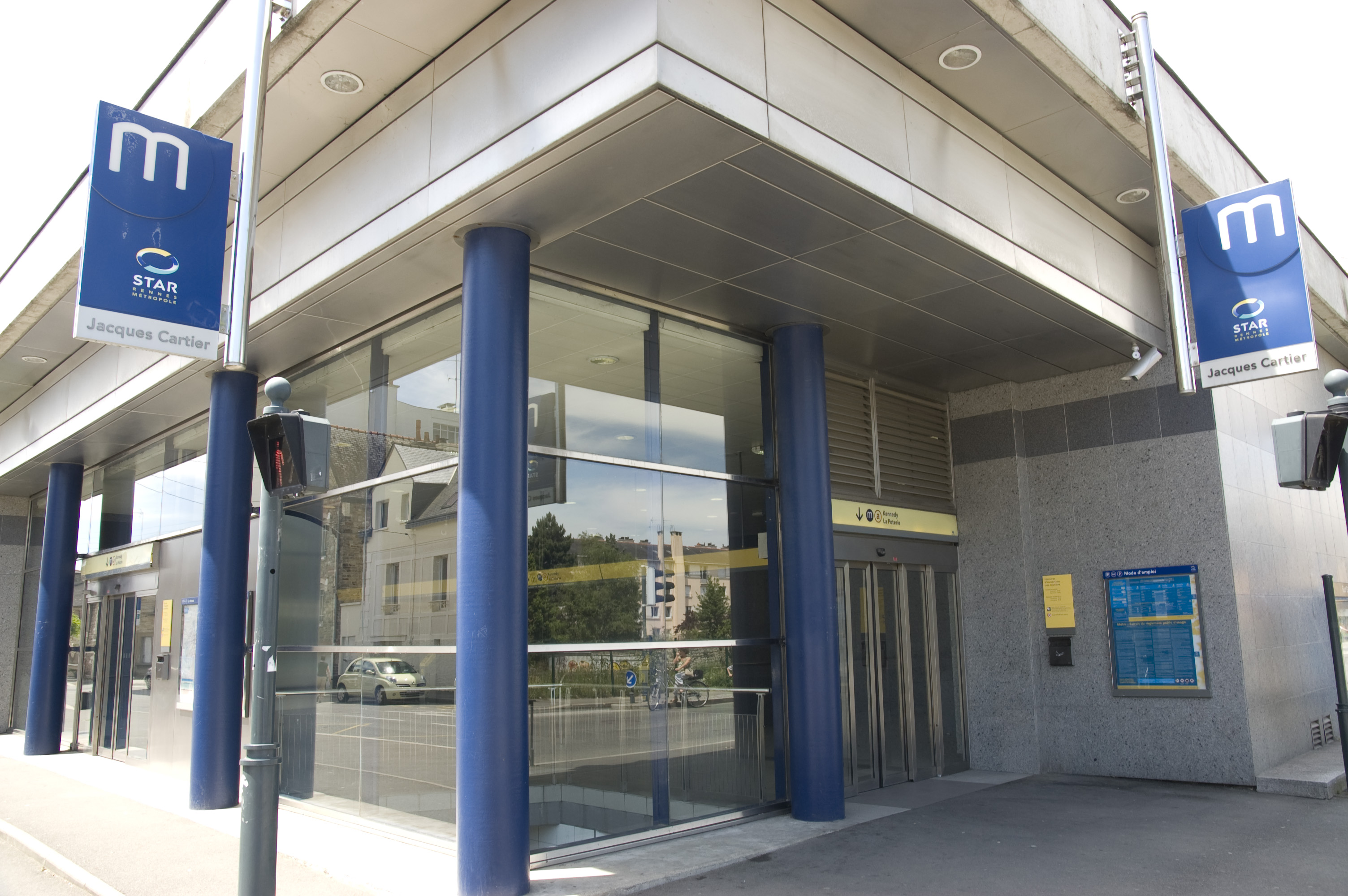 Station Jacques Cartier